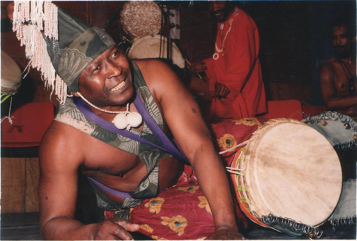 Deze foto is gemaakt door en eigendom van Djembégroep Talasa. Hij komt van de site Ik ben lid van deze Djembégroep en heb deze site gemaakt.